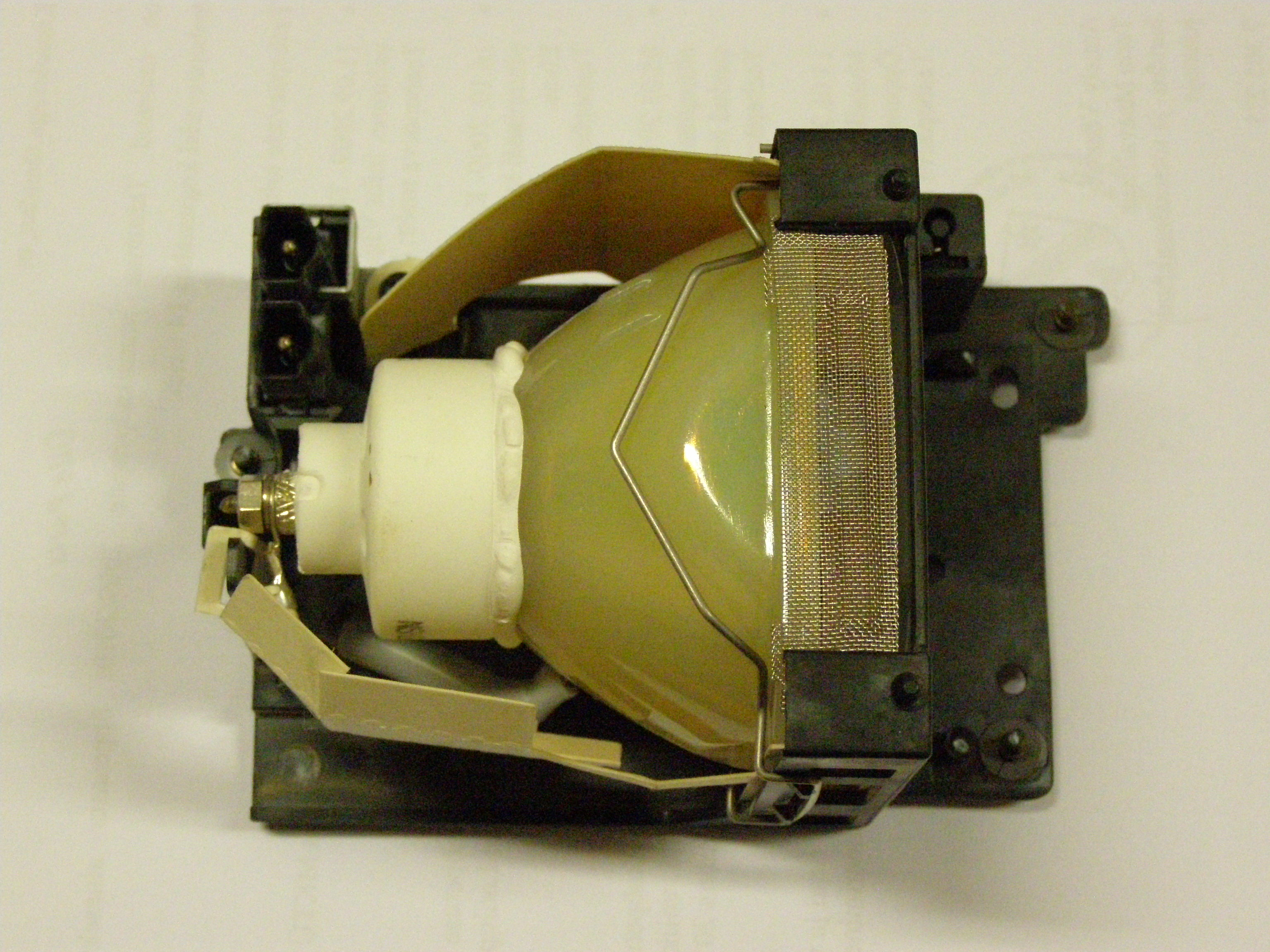 LCD-projektori lamp